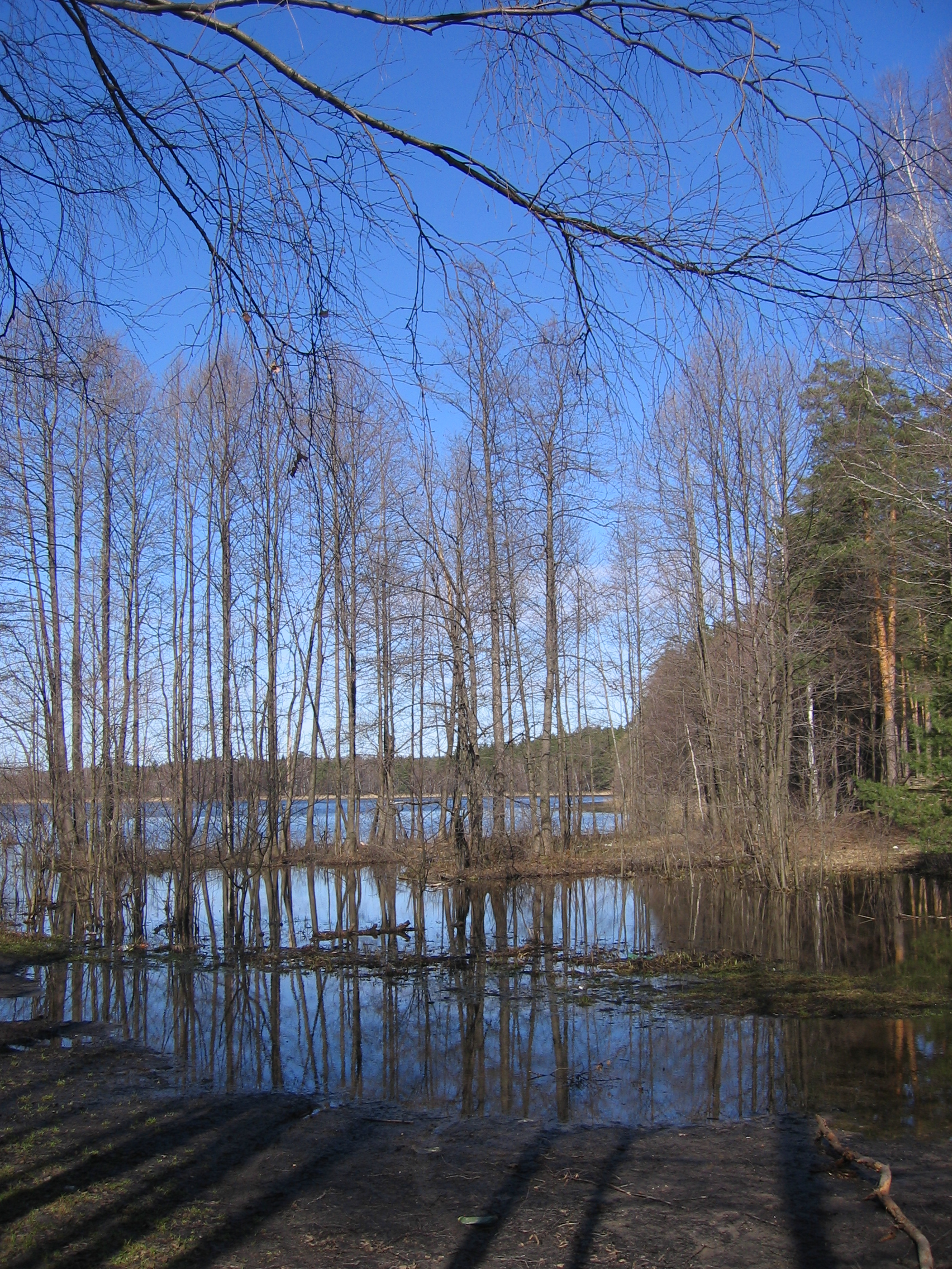 Владимирская область, г. Покров. р. Шитка в половодье.